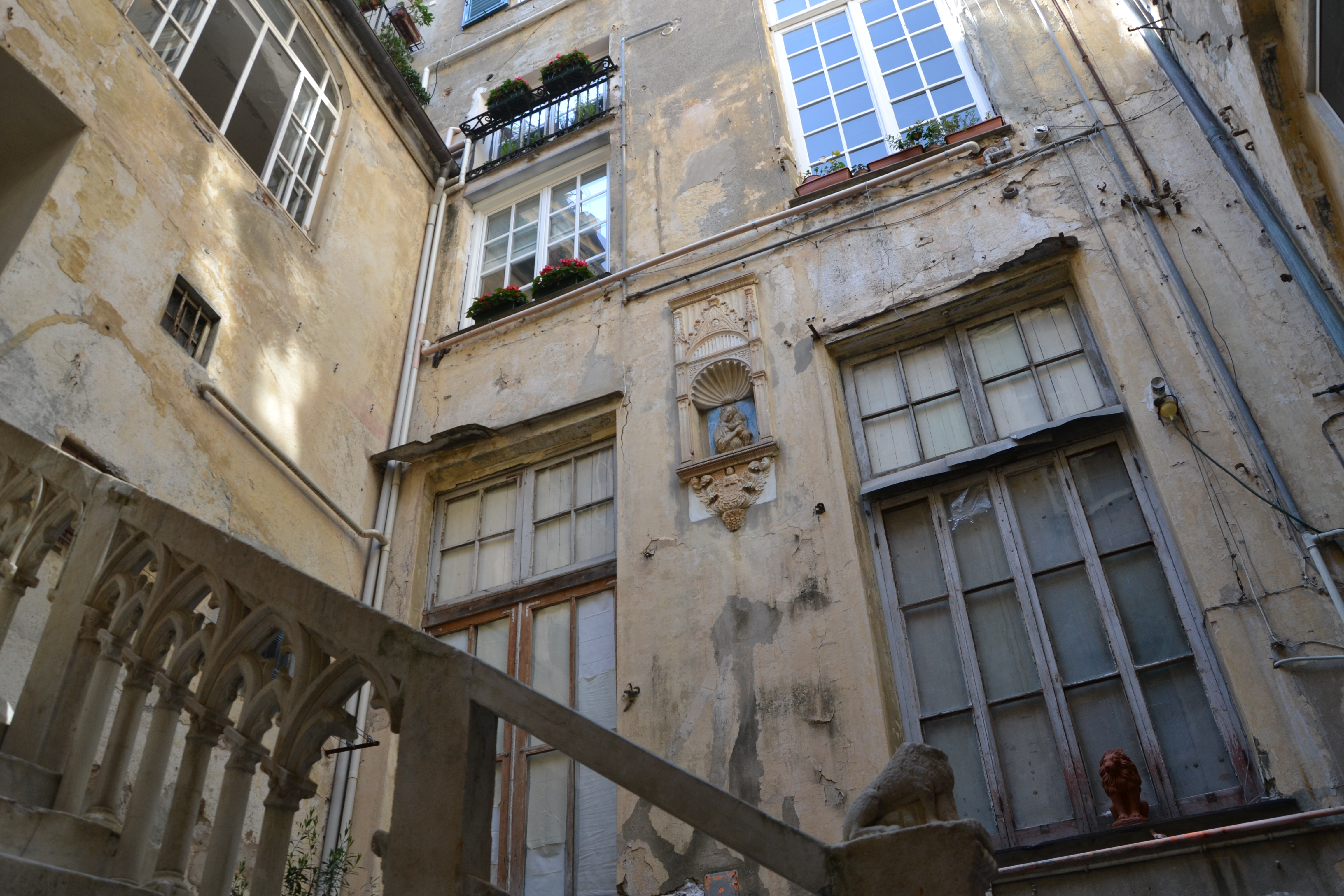 Palazzo Brancaleone Grillo